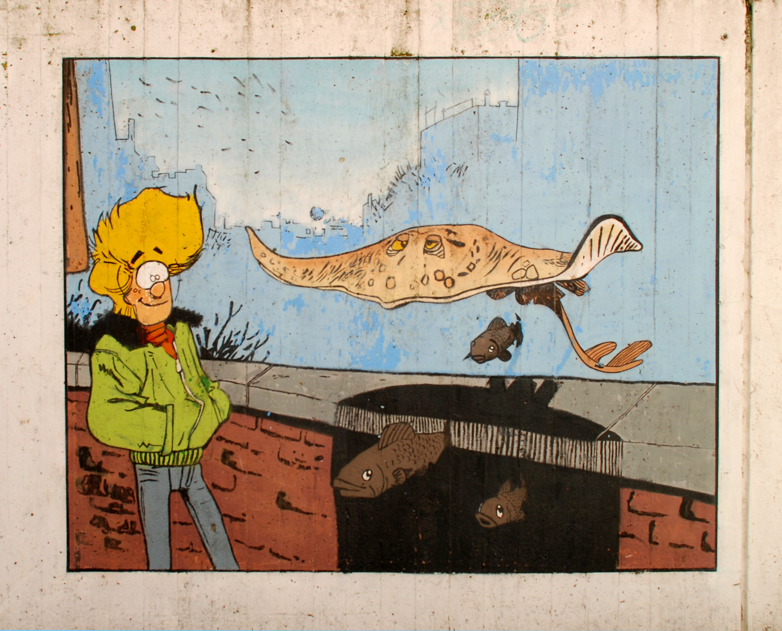 Belgique - Louvain-la-Neuve - Fresque Baleines publiques (FOP in Belgium since 2016)